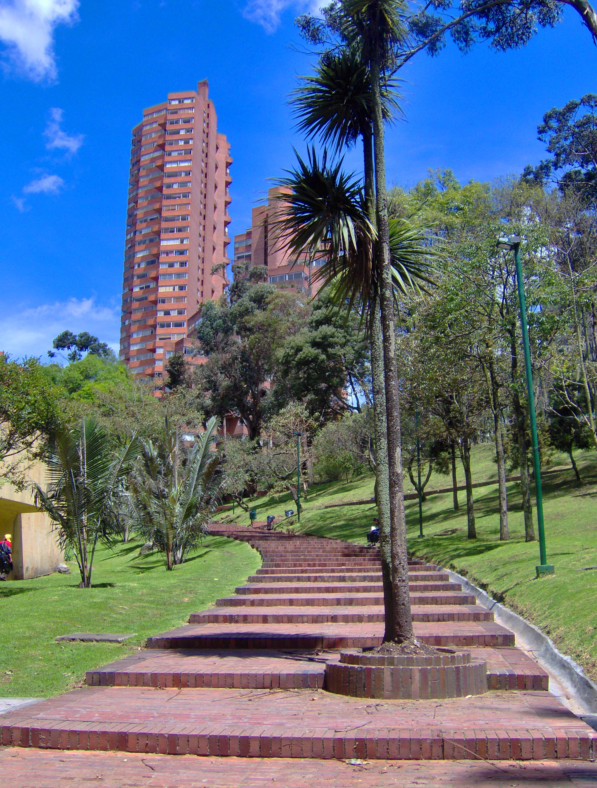 Parque de la independencia frente a las torres del parque, Bogotá